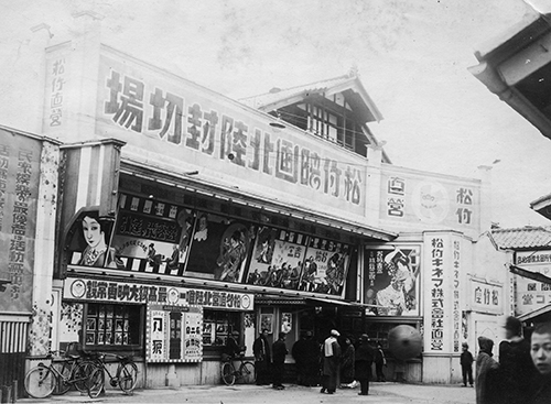 金沢市の松竹座。『お坊吉三』（1929年、冬島泰三監督）と『春容恋達引』（1929年、重宗務監督）上映中。